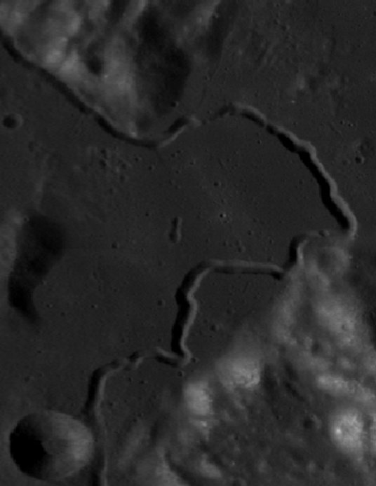 Cráter lunar Julienne. Localización. (Imagen LRO)